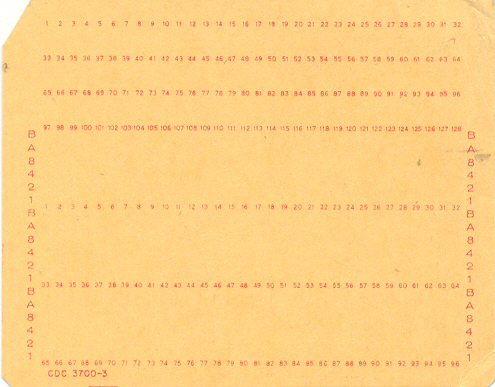 Carte perforée informatique de 96 colonnes utilisée par IBM (entre autres, sur IBM System 10).